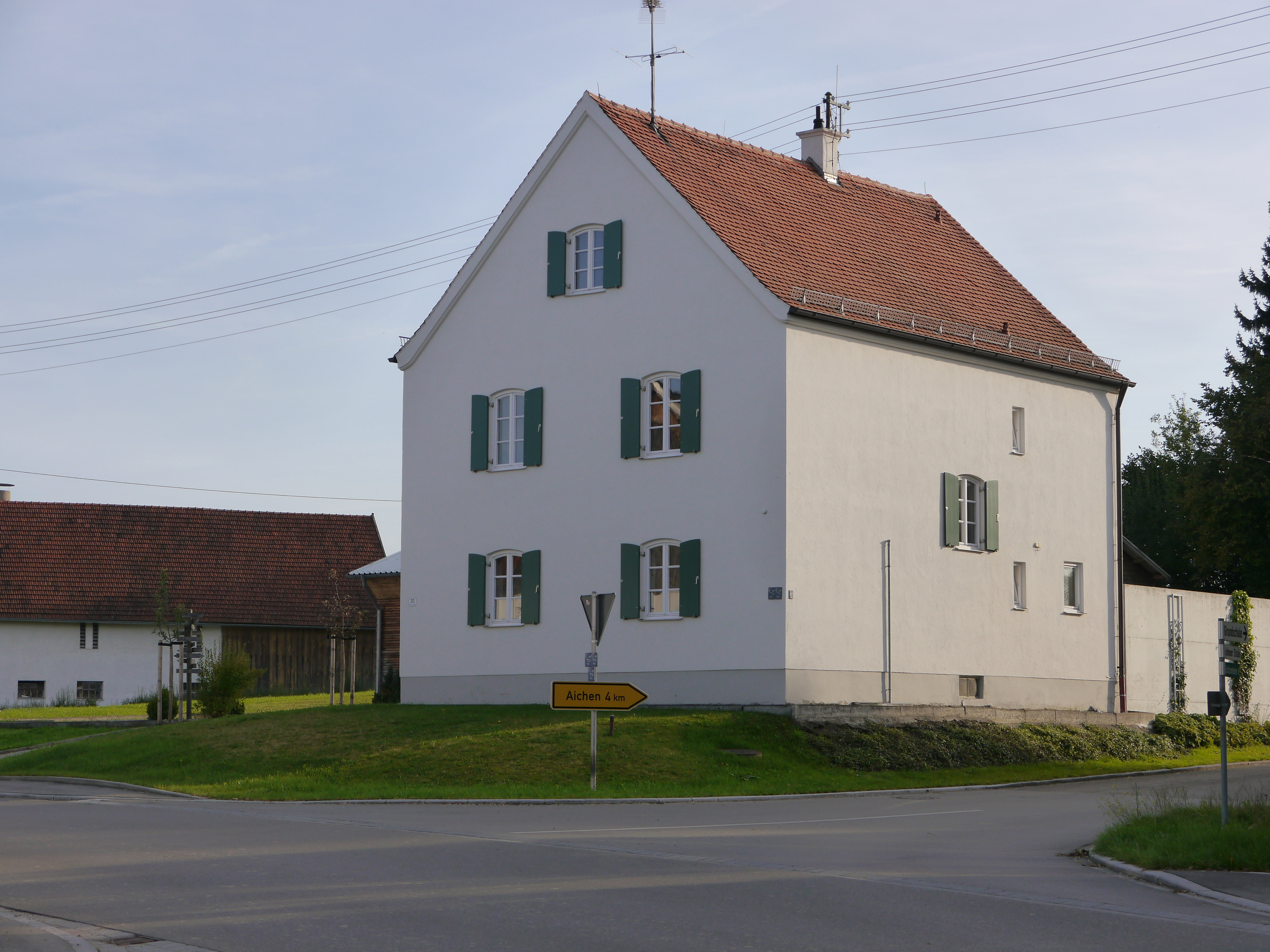 PfarrhausThis is a photograph of an architectural monument.